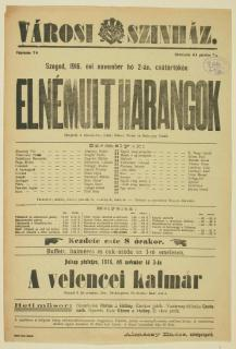 Rákosi Viktor - Malonyai Dezső: Elnémult harangok (A zenés előadás plakátja, 1916. november 02.)